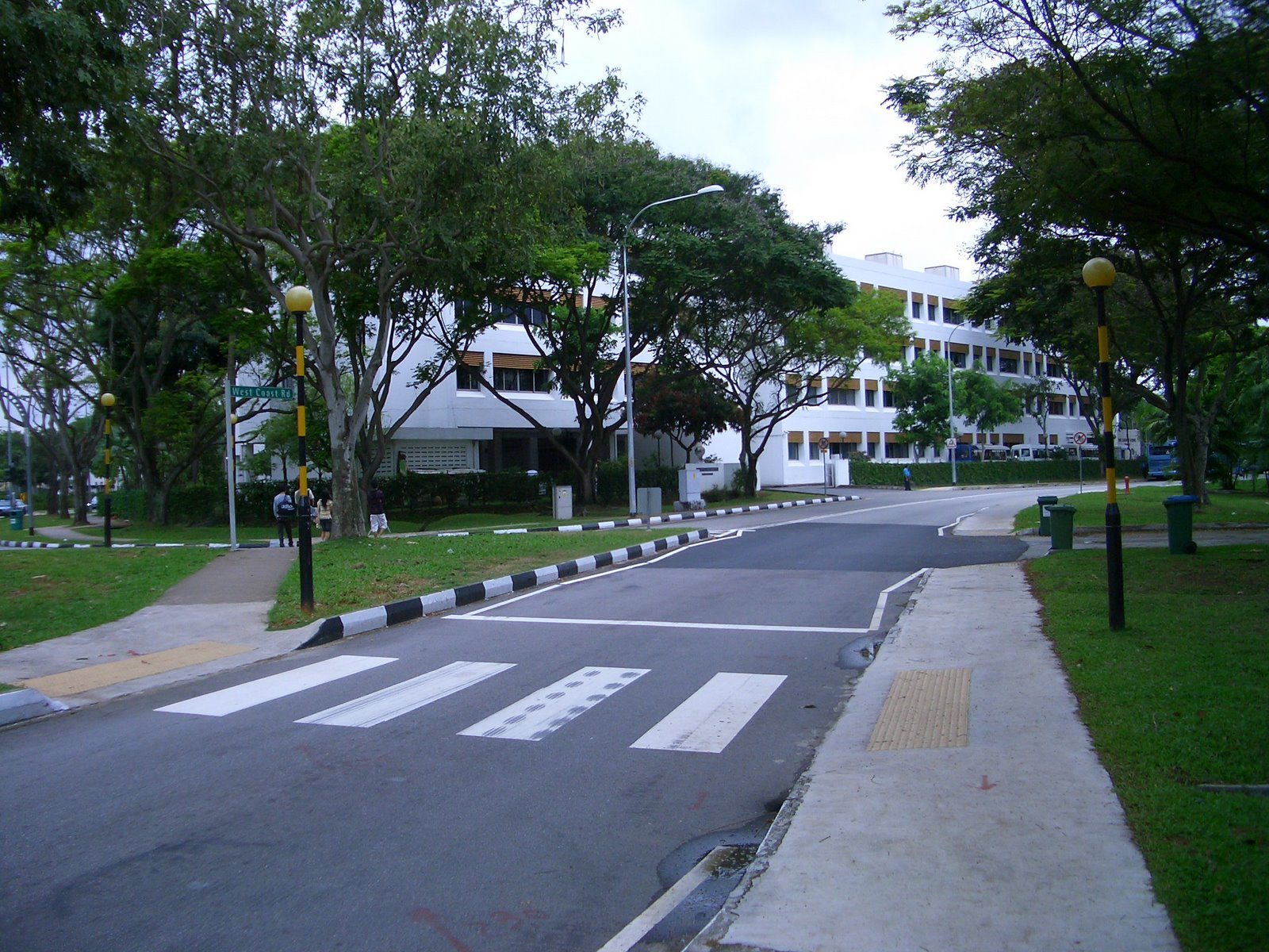 シンガポール日本人学校中学部